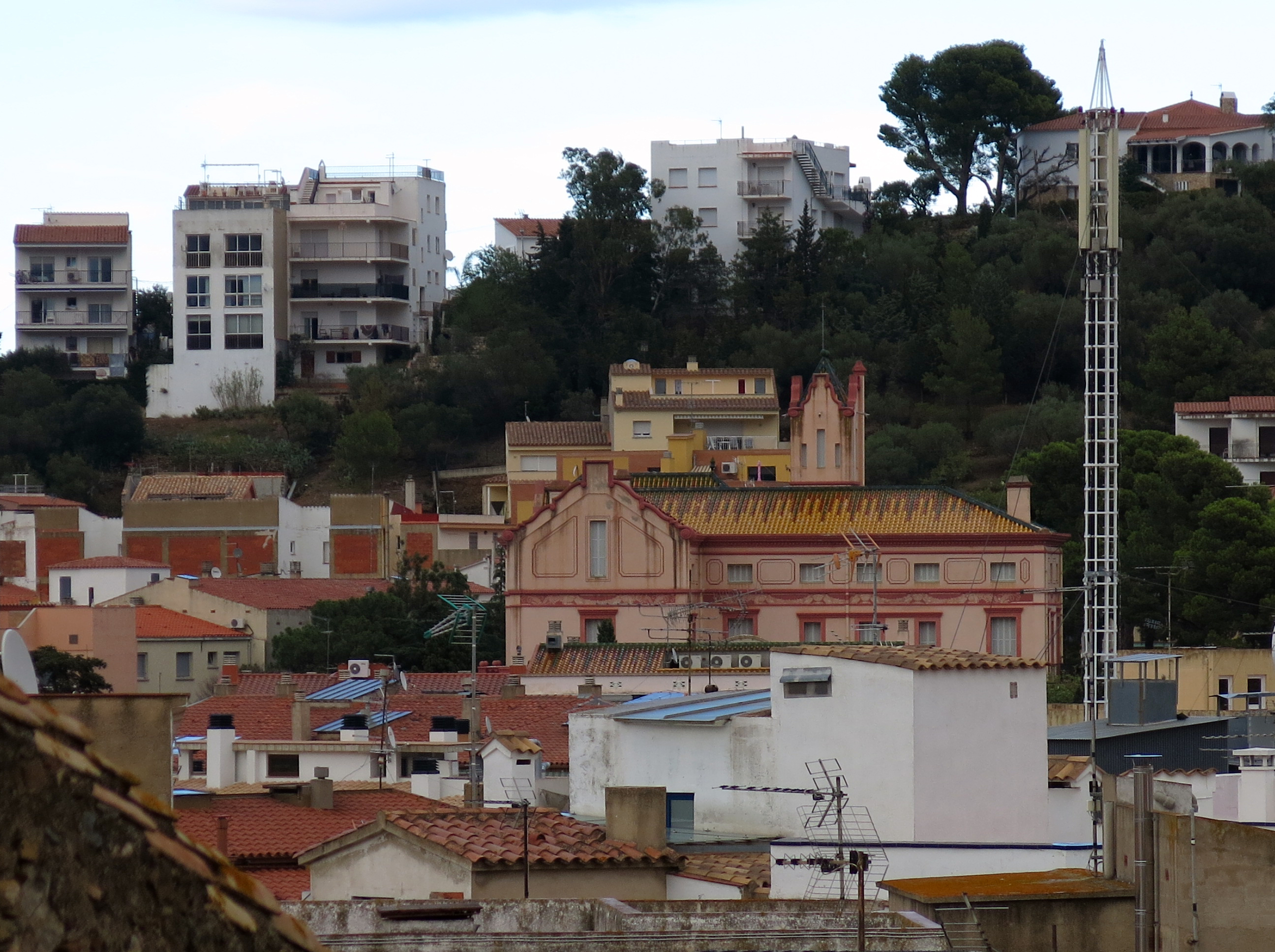 Casa Marly (Llançà)